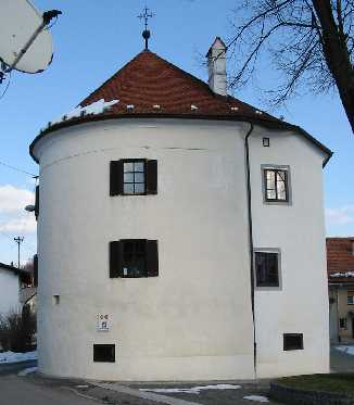 Turn, Šmarje - Sap